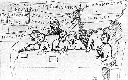 Бюракраты (на сходзе)